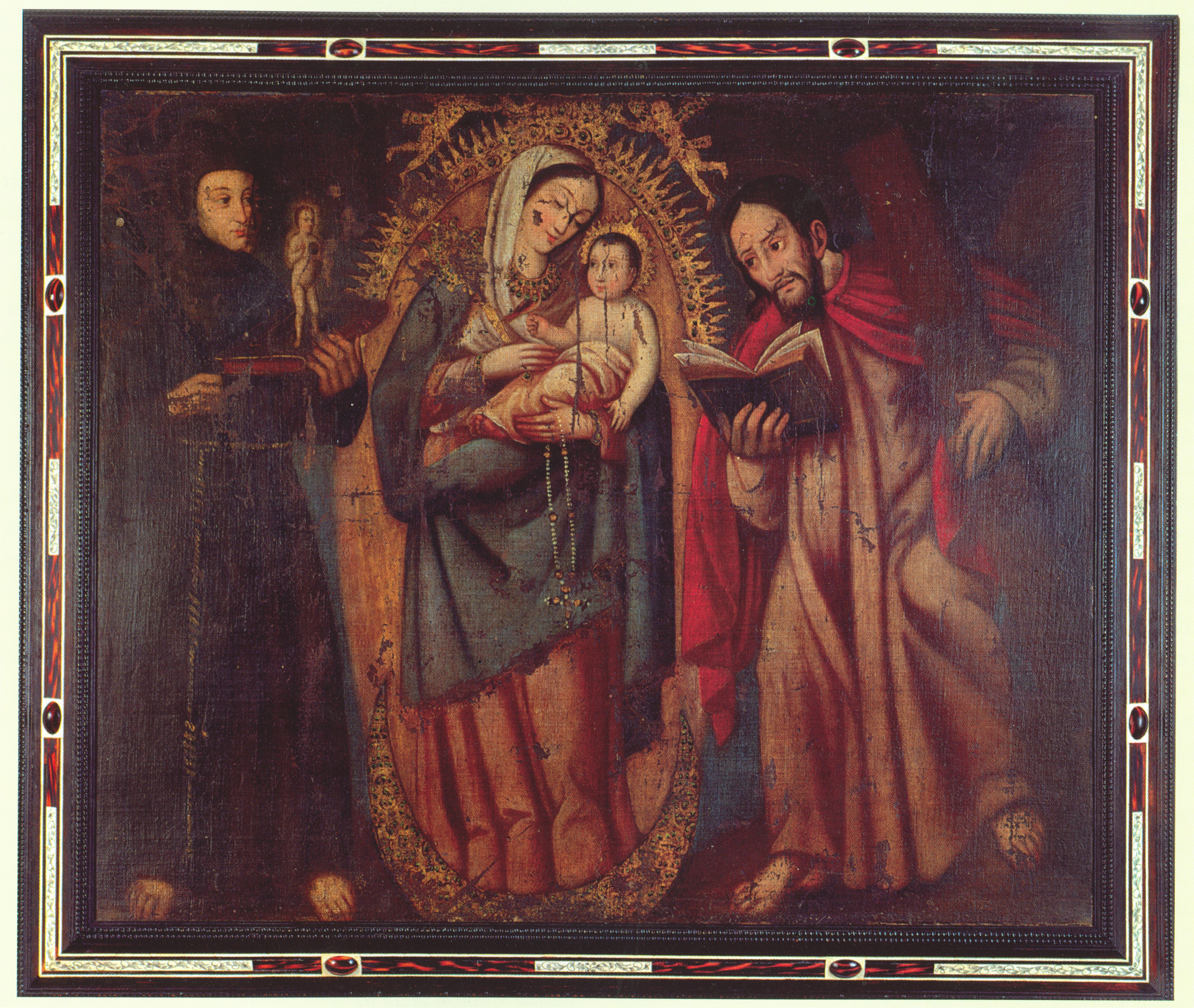 Imagen de la Virgen de Chinquinquirá - Museo del Banco de la Republica de Colombia. Diapositiva digitalizada en los fondos Bibliográficos del Archivo Historico del Guayas (AHG); Guayaquil, Ecuador.